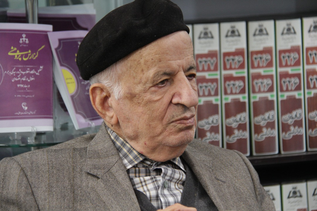 مهدی محقق در مرکز پژوهشی دانشنامه های حقوقی علامه